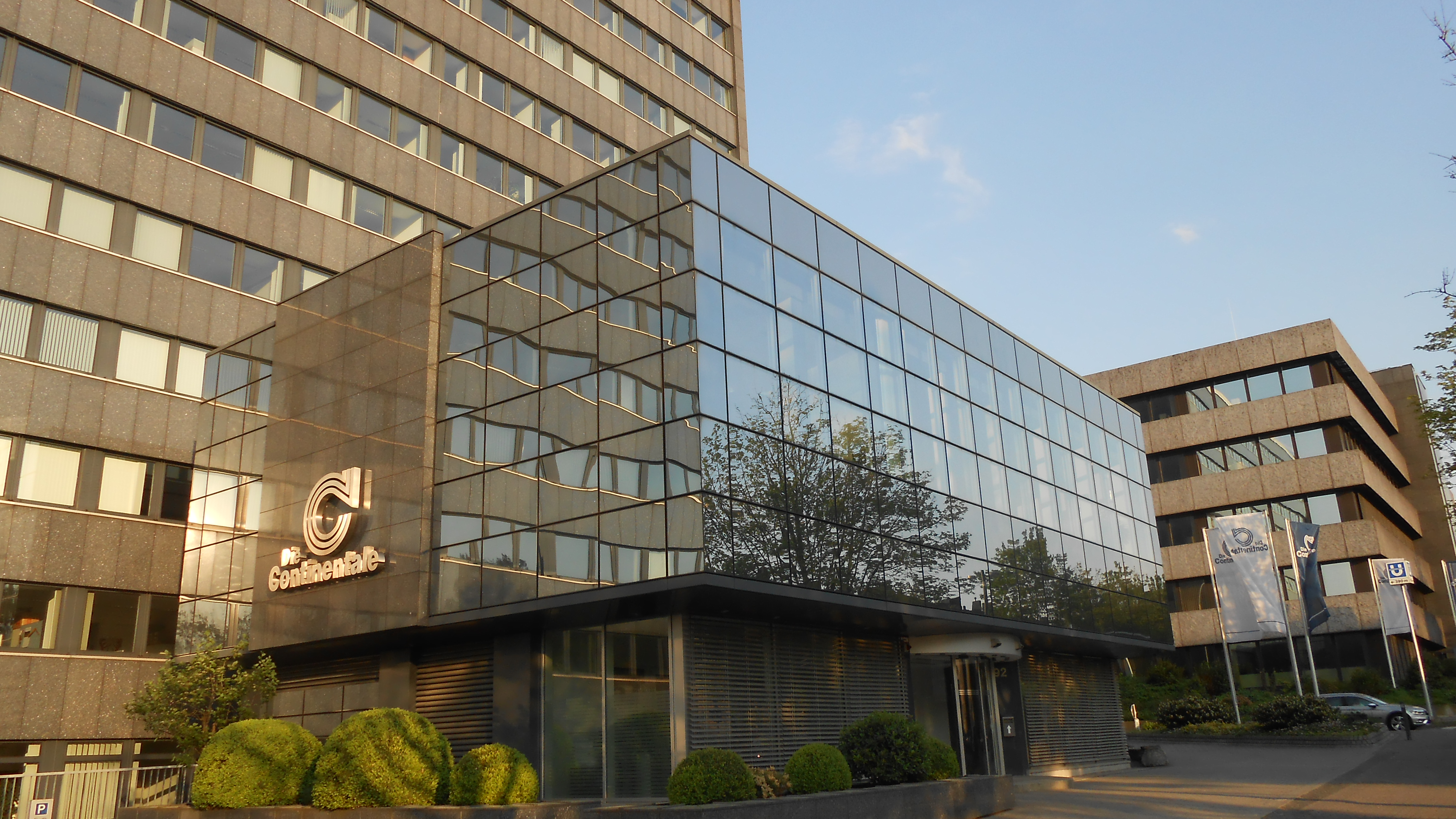 Die Hauptverwaltung der Continentale Versicherungen an der Ruhralle (B54) in der südlichen Innenstadt Dortmunds.